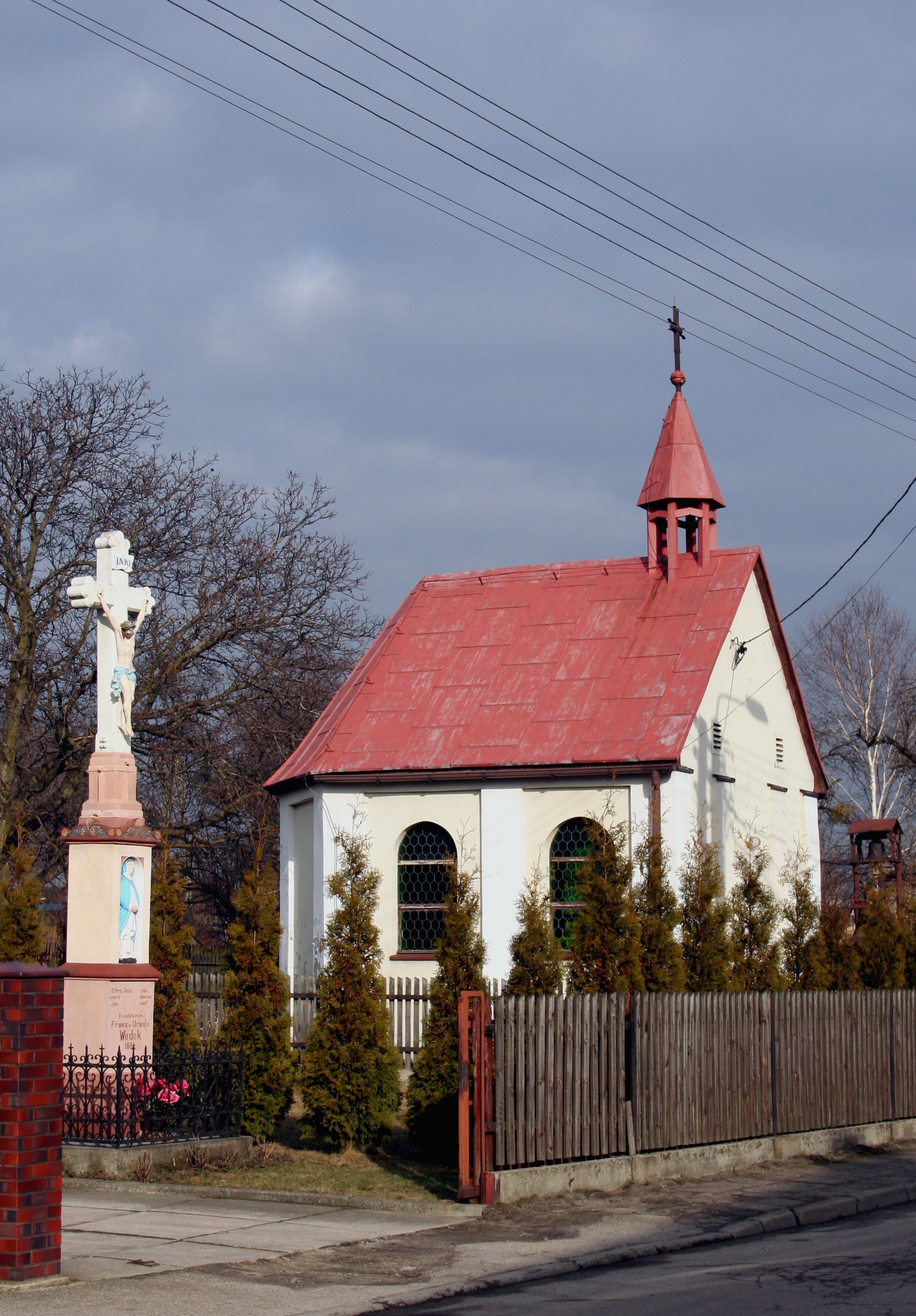 Szczejkowice, kapliczka przy ul. Rybnickiej, woj. śląskie